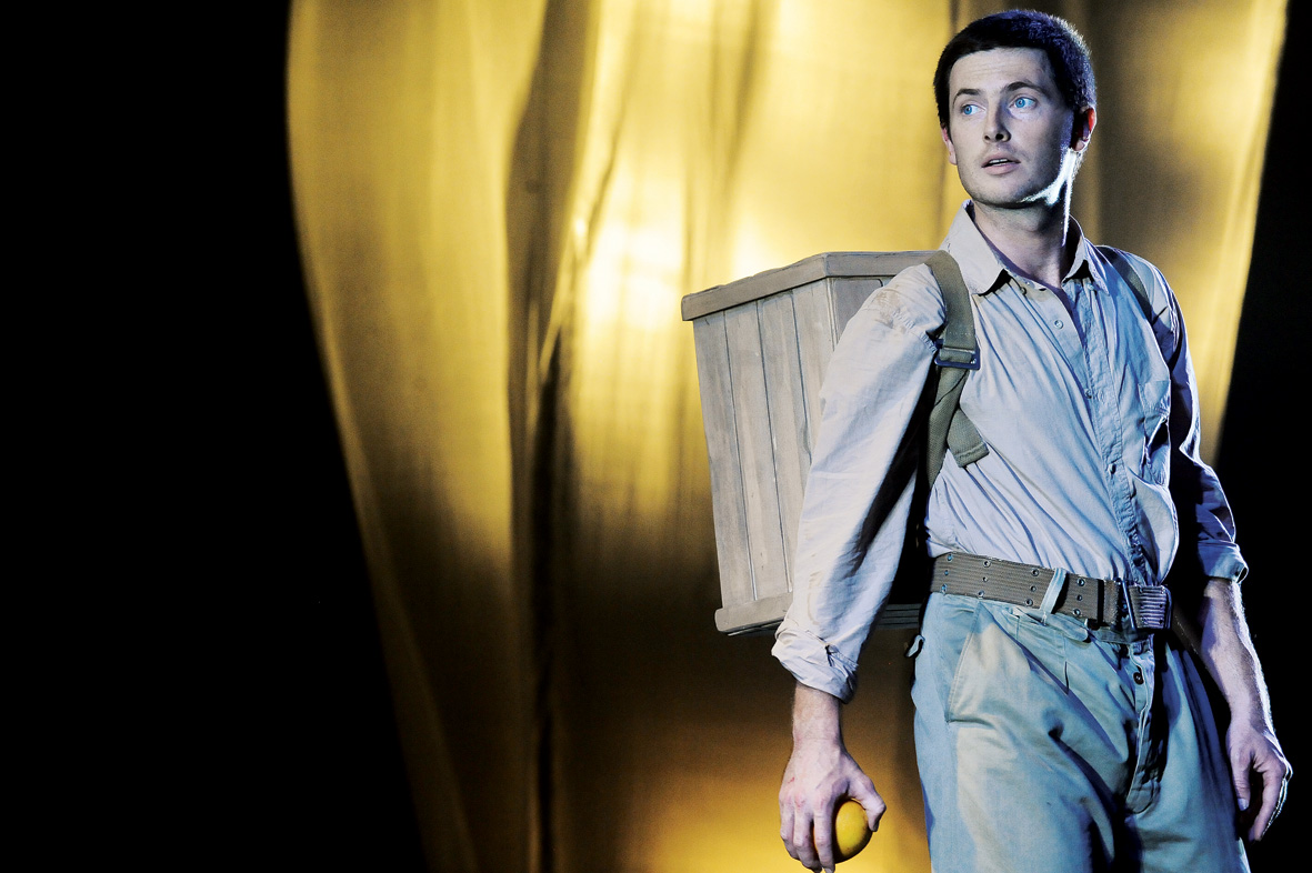 הנרי דוד - יונה ונער - 2011 - גדי דגון